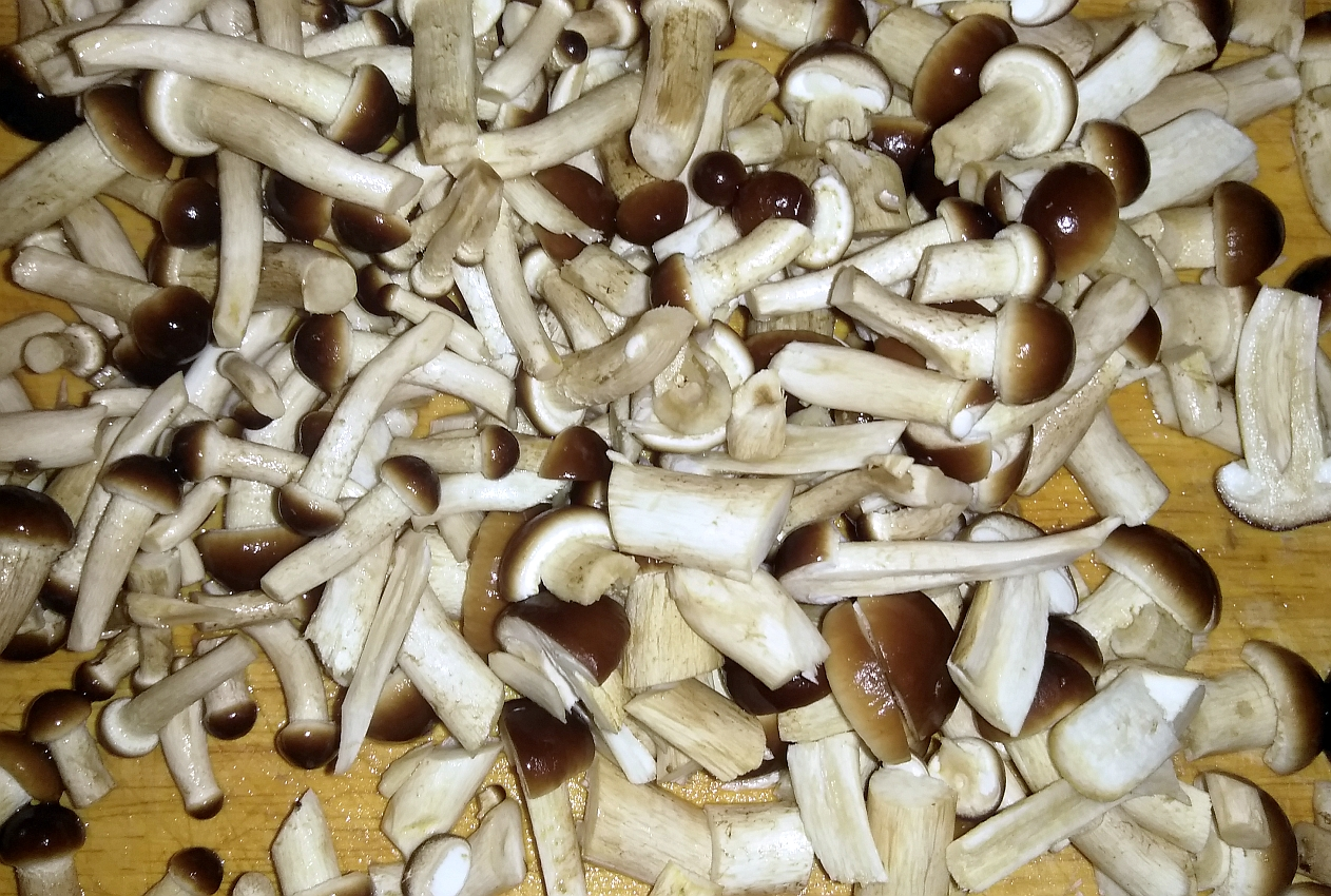 Pioppini (Cyclocybe aegerita) lavati e tagliati, pronti per essere cucinati